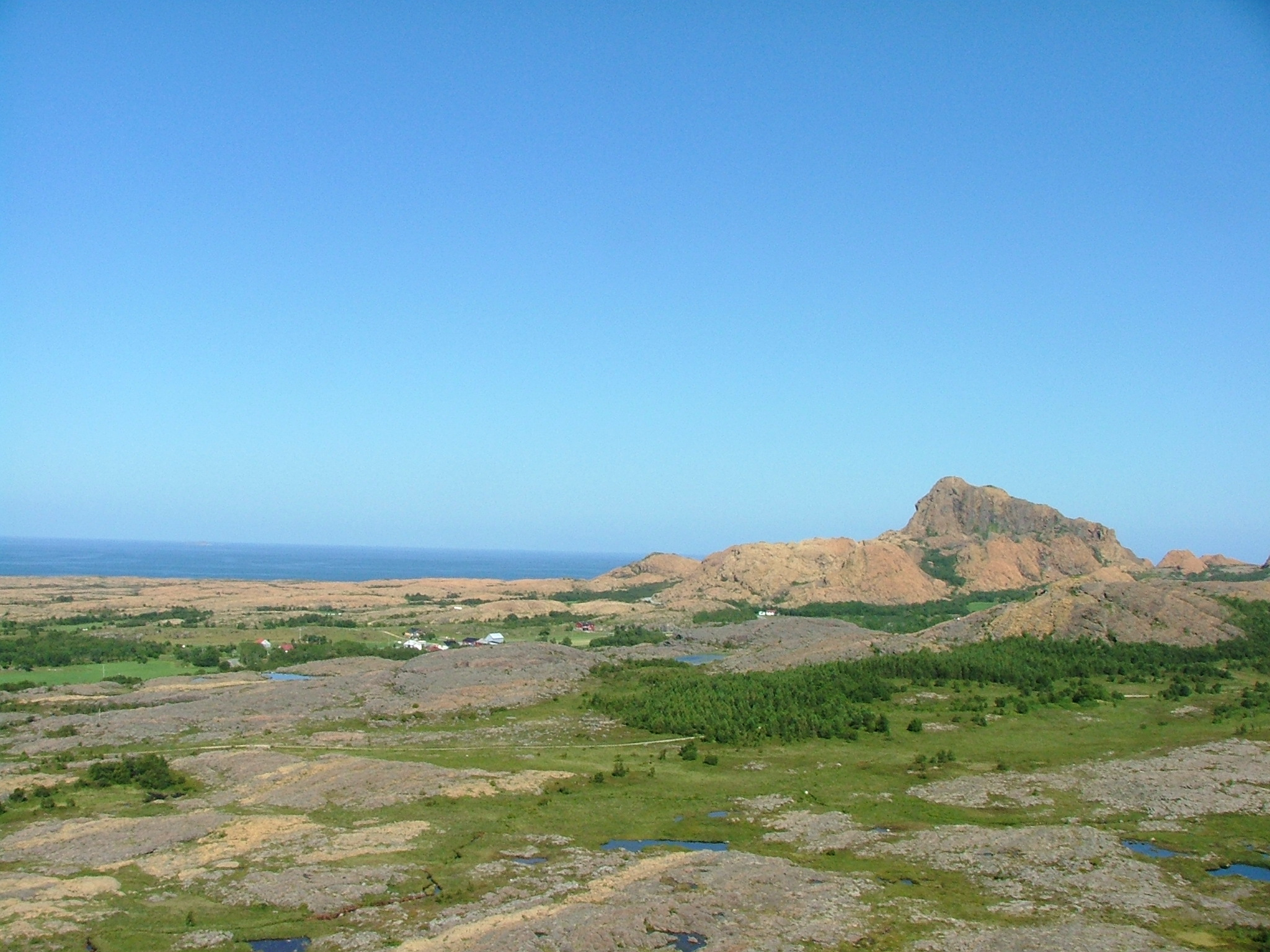 Steinstind, Leka, sett frå Aune. Foto: Ørjan Aarmo